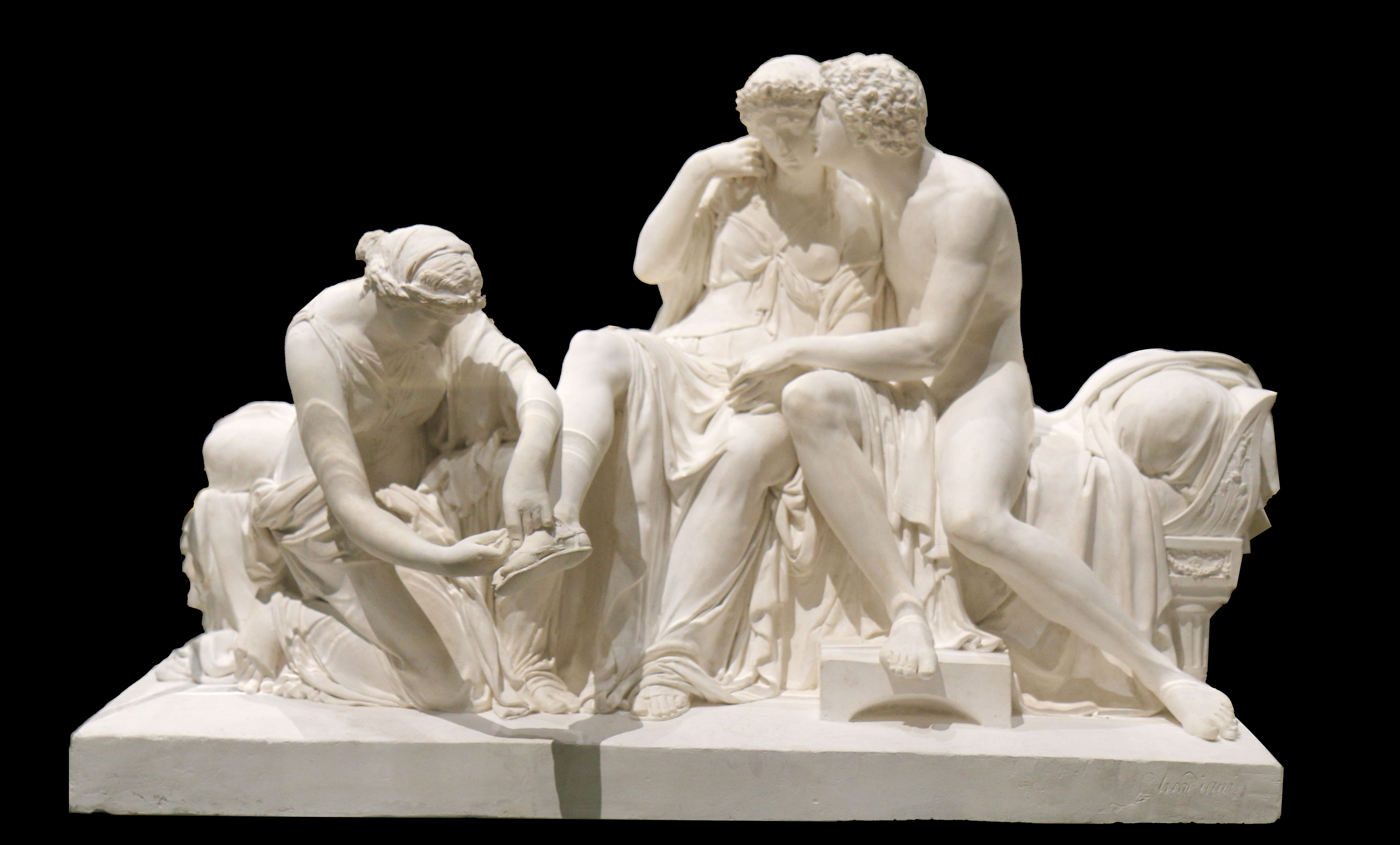 groupe relié